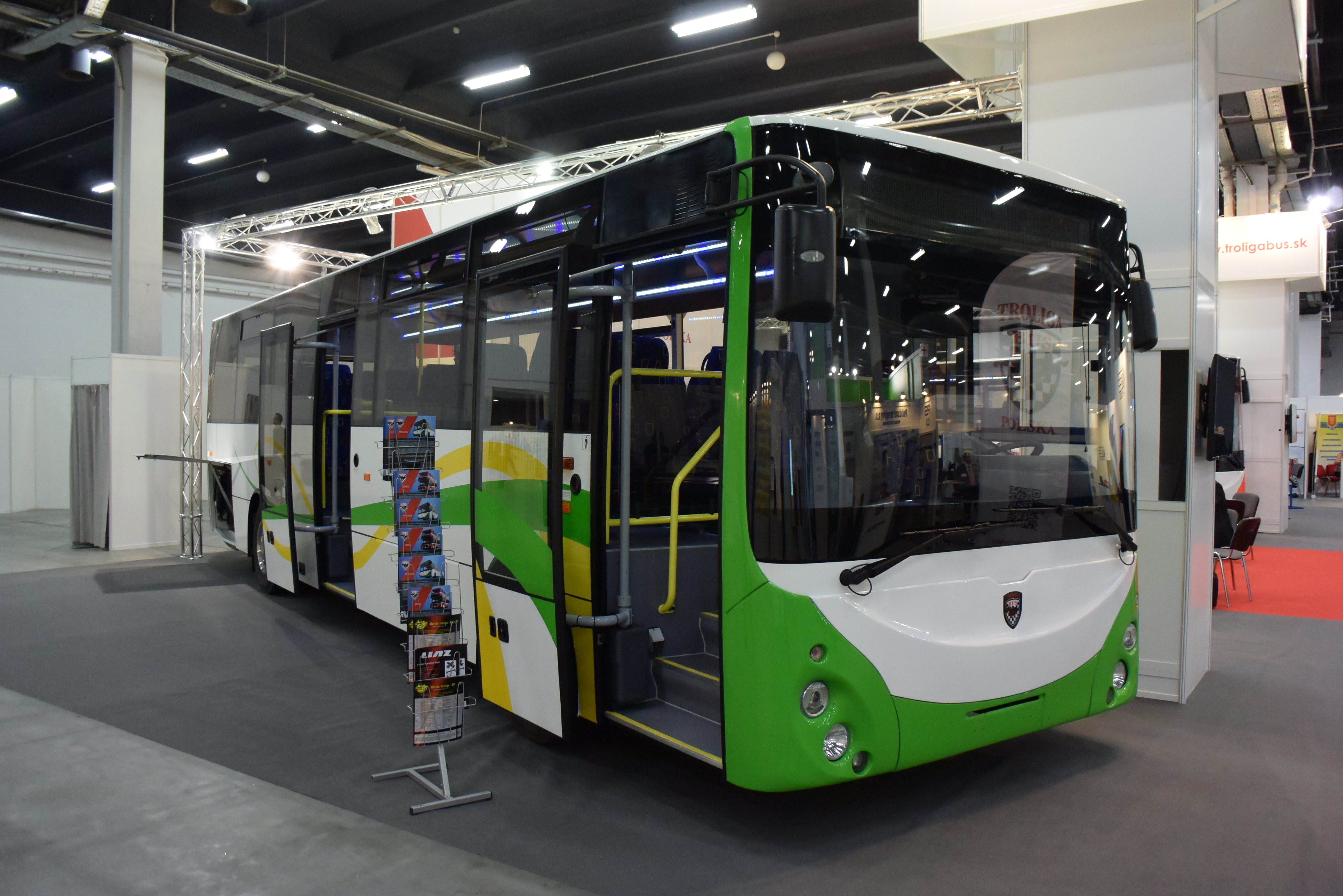 Troliga Bus Pegasus, Transexpo 2014, Kielce